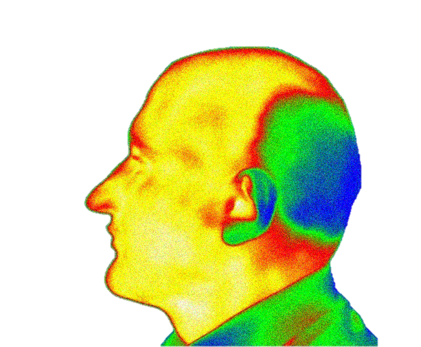 Термография головы бритого налысо человека после сна на охлаждённой (для лучшего контрастирования) подушке.